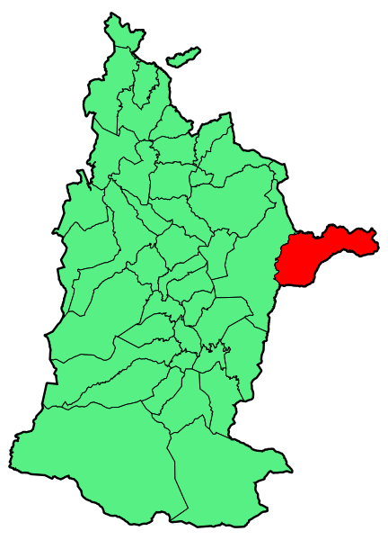 Aipaturiko udalerriaren kokapena Zuberoan